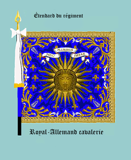 Standarte des Kavallerieregiments „Royal-Allemand“ Königreich Frankreich